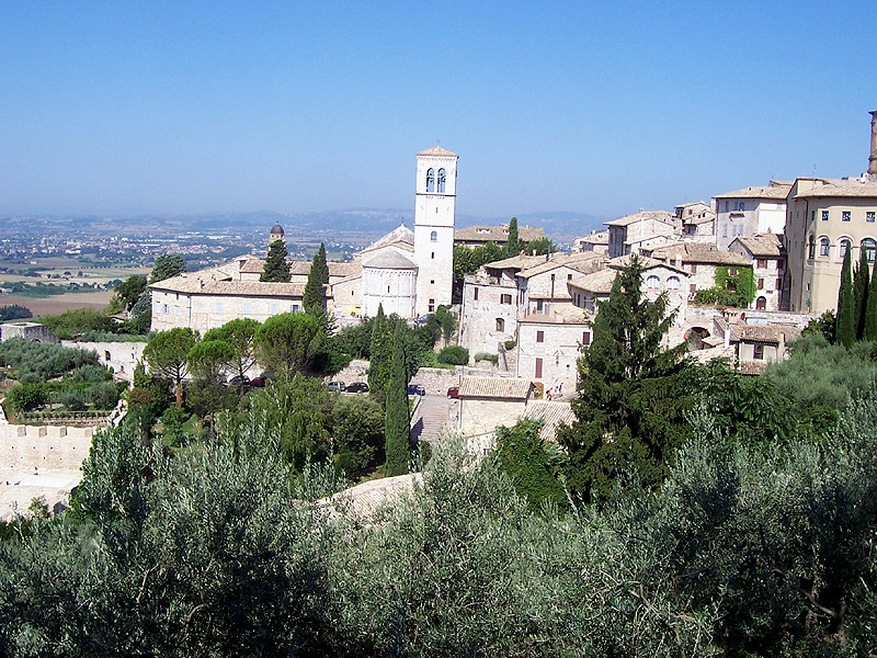 Assisi - Chiesa di S. Maria Maggiore (vista da Piazza S. Chiara)